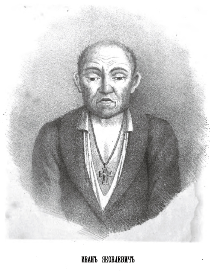 Ivan Yakovlevich Koreisha